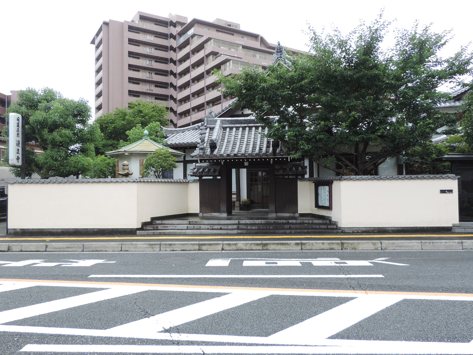 源立寺（大阪府池田市） ※画像を一部加工しております